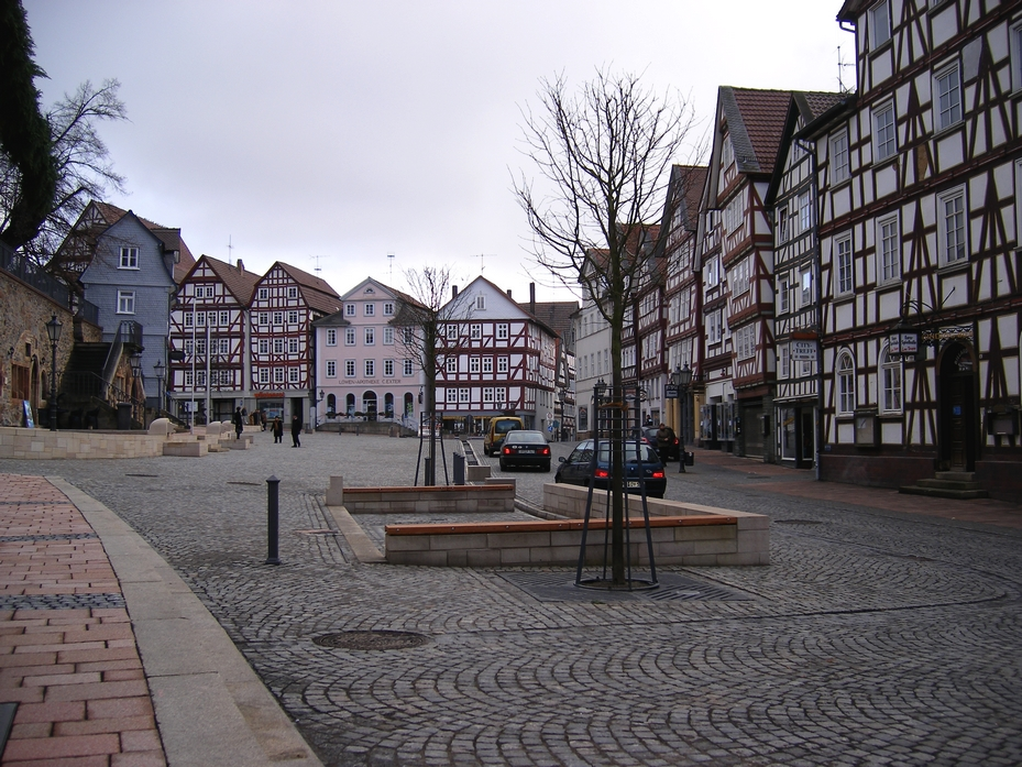 Blick auf den östlichen Marktplatz